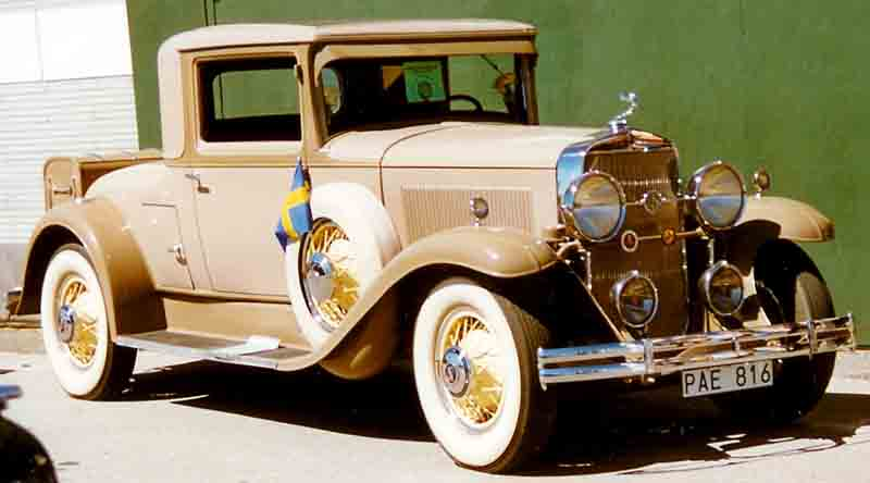 La Salle Series 340 Coupé 1930